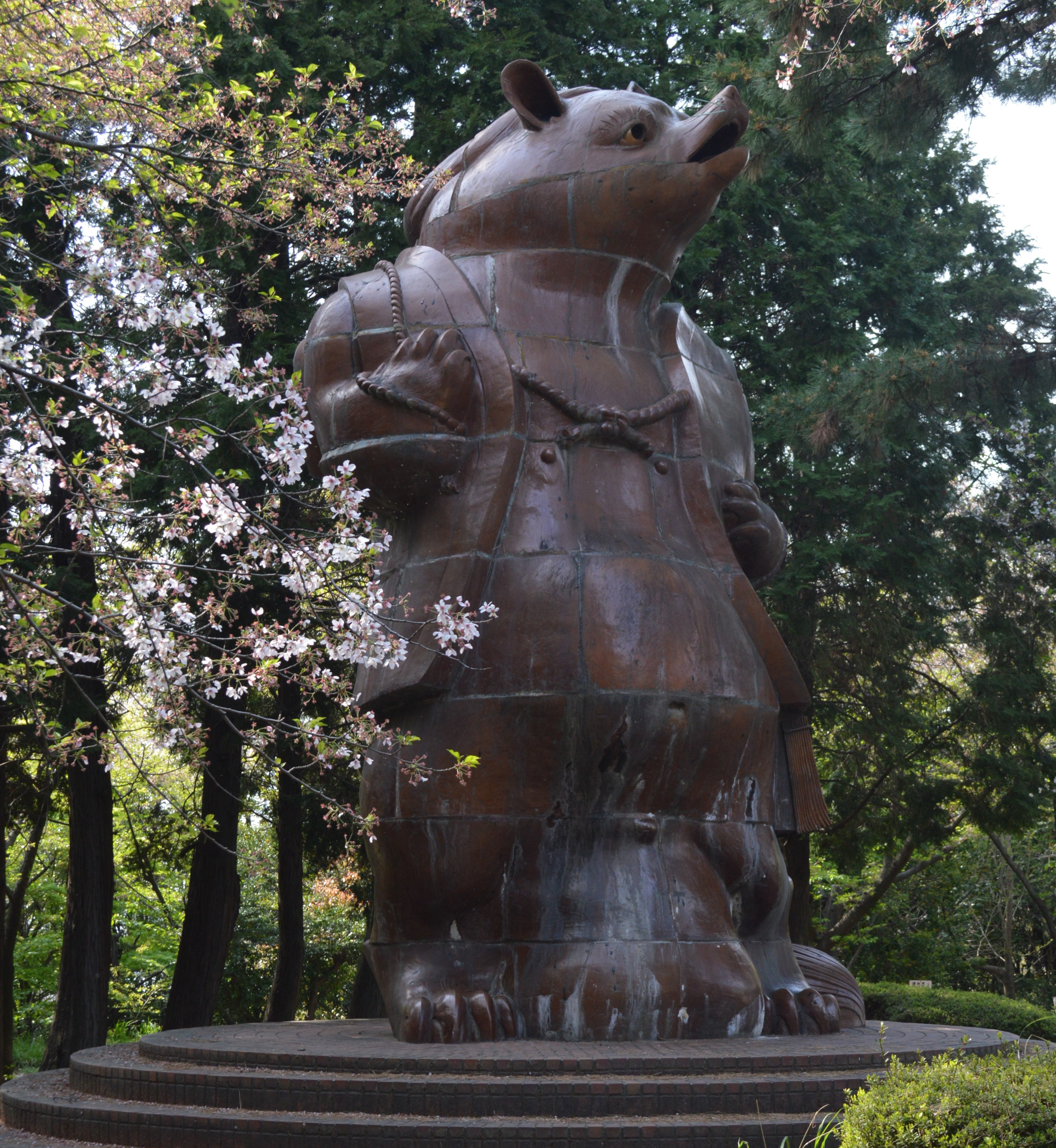 愛知県高浜市の大山緑地（大山公園）にある大たぬき。